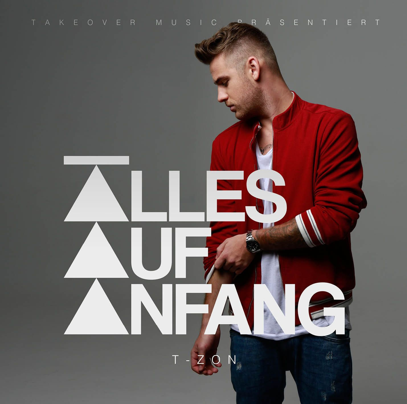 Cover des Albums „Alles aus Anfang“